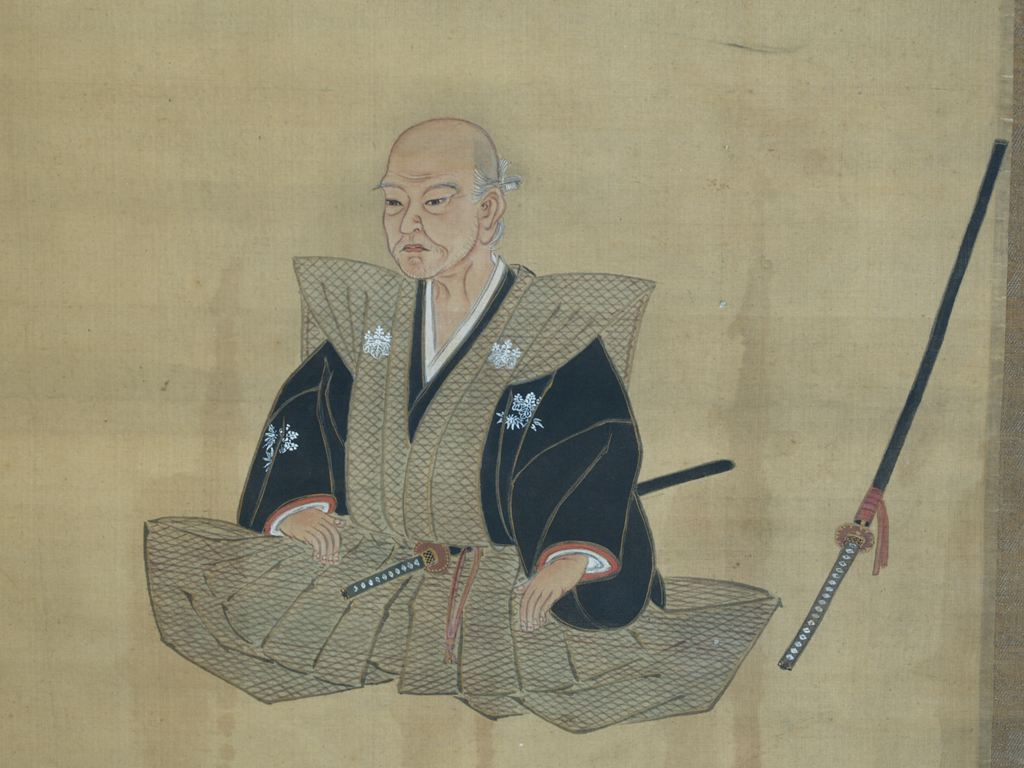 村岡山名三代、山名矩豊